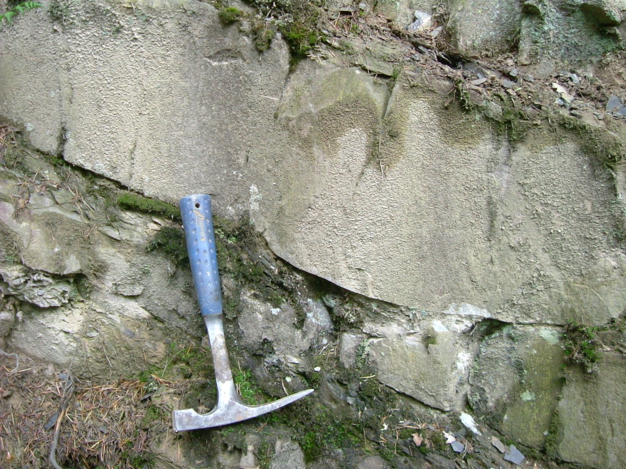 Wechsellagerung aus oberkarbonischen Sand- und Tonsteinen (Arnsberger Schichten) am Mühlenberg , Rummecketal